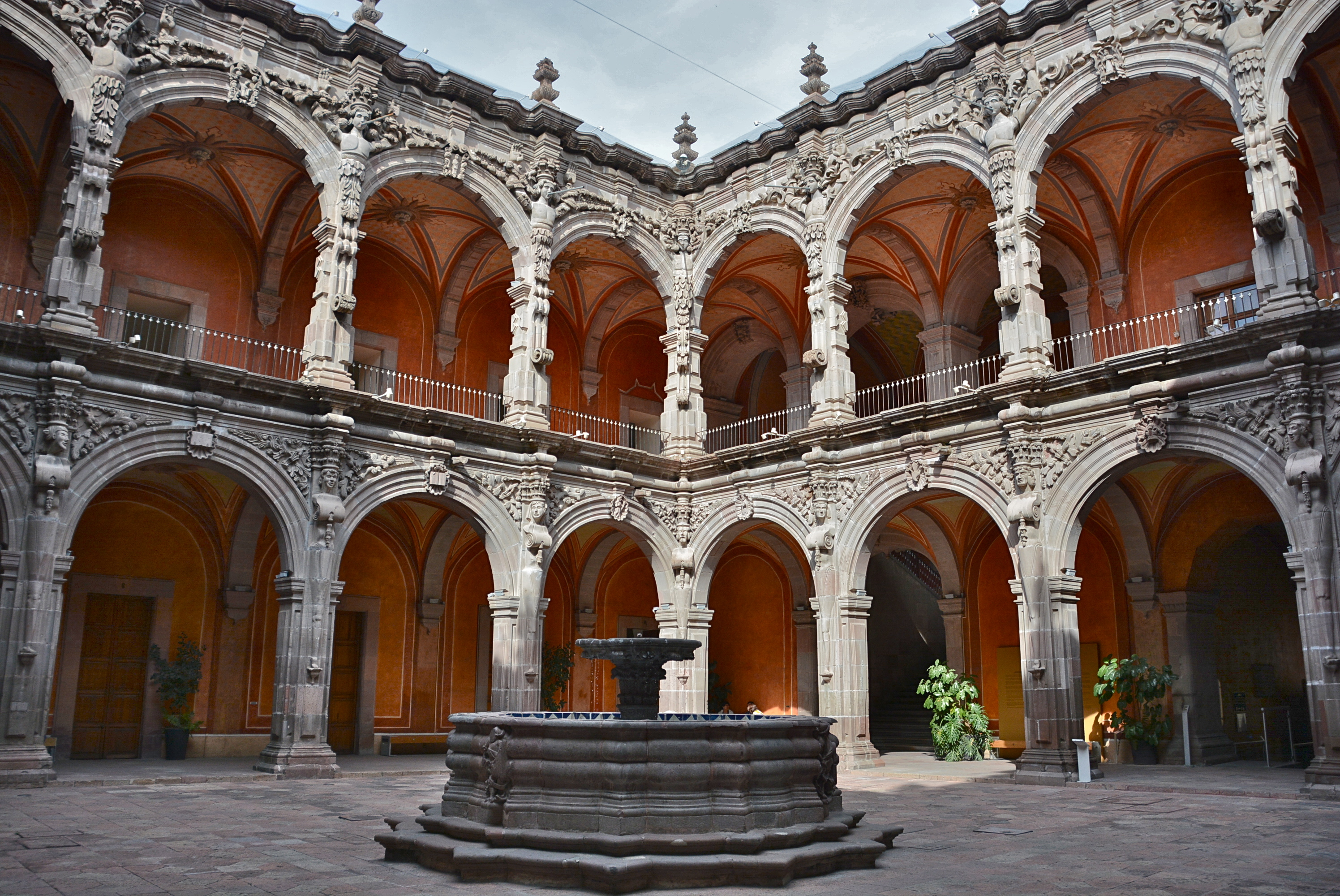 Museo público de arte en el Centro histórico de la ciudad de Santiago de Querétaro.